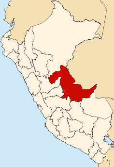 Разположение на регион Укаяли в Перу.